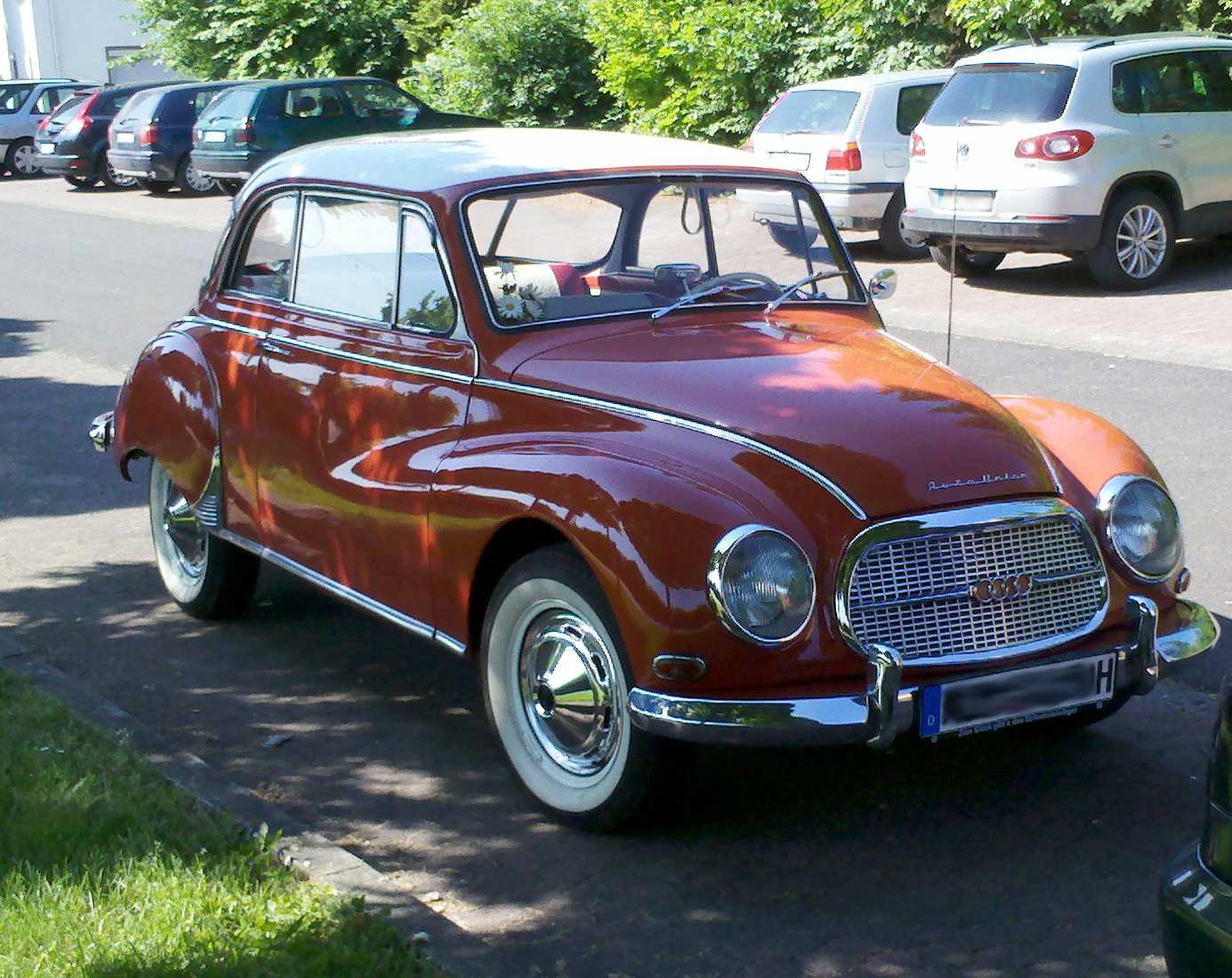 Auto Union 1000 Coupè de luxe Baujahr 1959, Modelljahr 1958